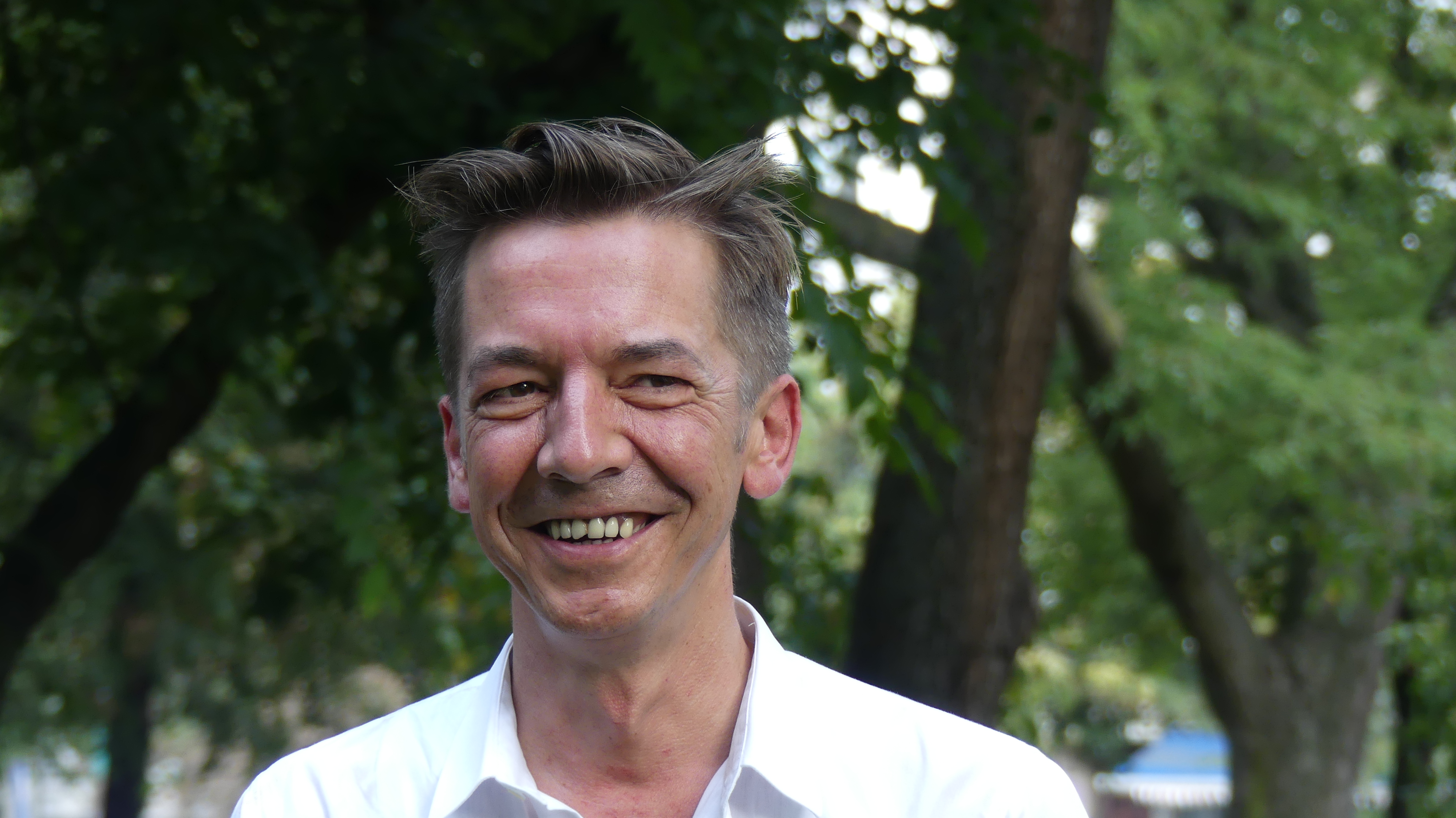 Carll Cneut at the gelbe Villa in Berlin during his participation at the section International Children´s and Young Adult Literature of the 16th International Literature Festival Berlin on September 11, 2016